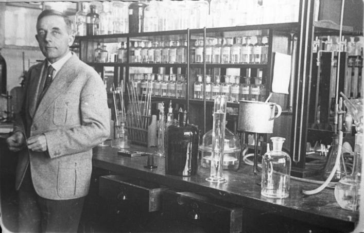 Ein deutscher Nobelpreisträger für Medizin ! Prof. Otto H. Warburg, der Direktor des Kaiser-Wilhelm-Instituts für Zell-Physiologie wurde der Nobelpreis für Medizin von der Nobelstiftung in Stockholm zuerkannt. Prof. Otto H. Warburg, der deutsche Nobelpreisträger für Medizin, in seinem Laboratorium im Kaiser-Wilhelm Institut in Berlin.